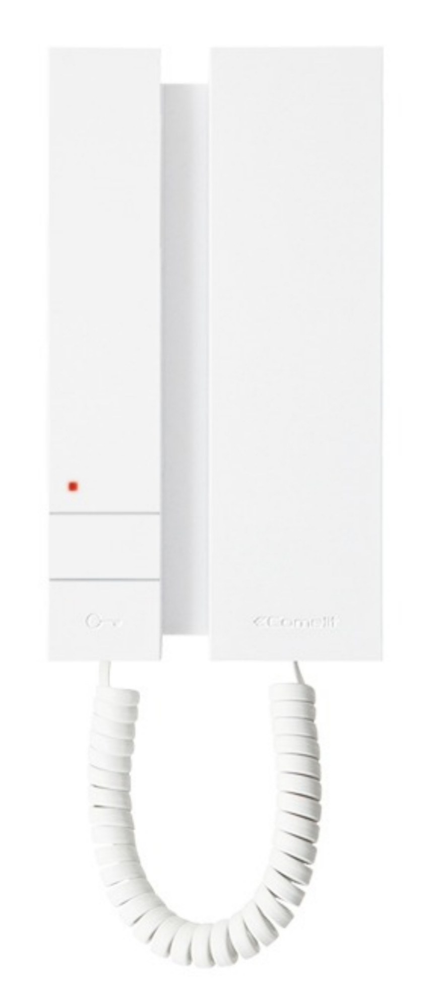 citofono posto interno modello mini Comelit abitazione Rug